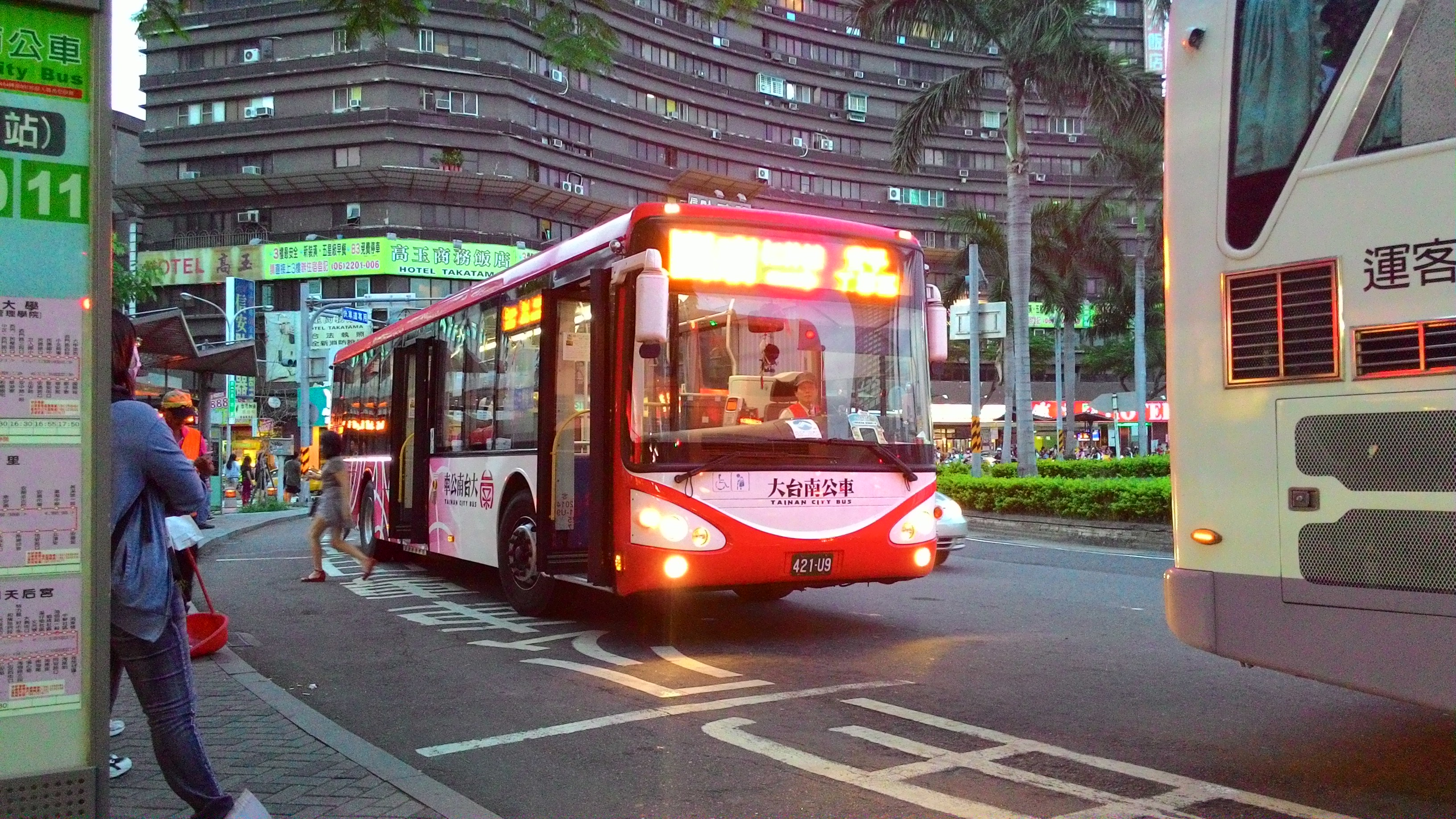 興南客運紅幹線申沃低底盤大巴421-U9。